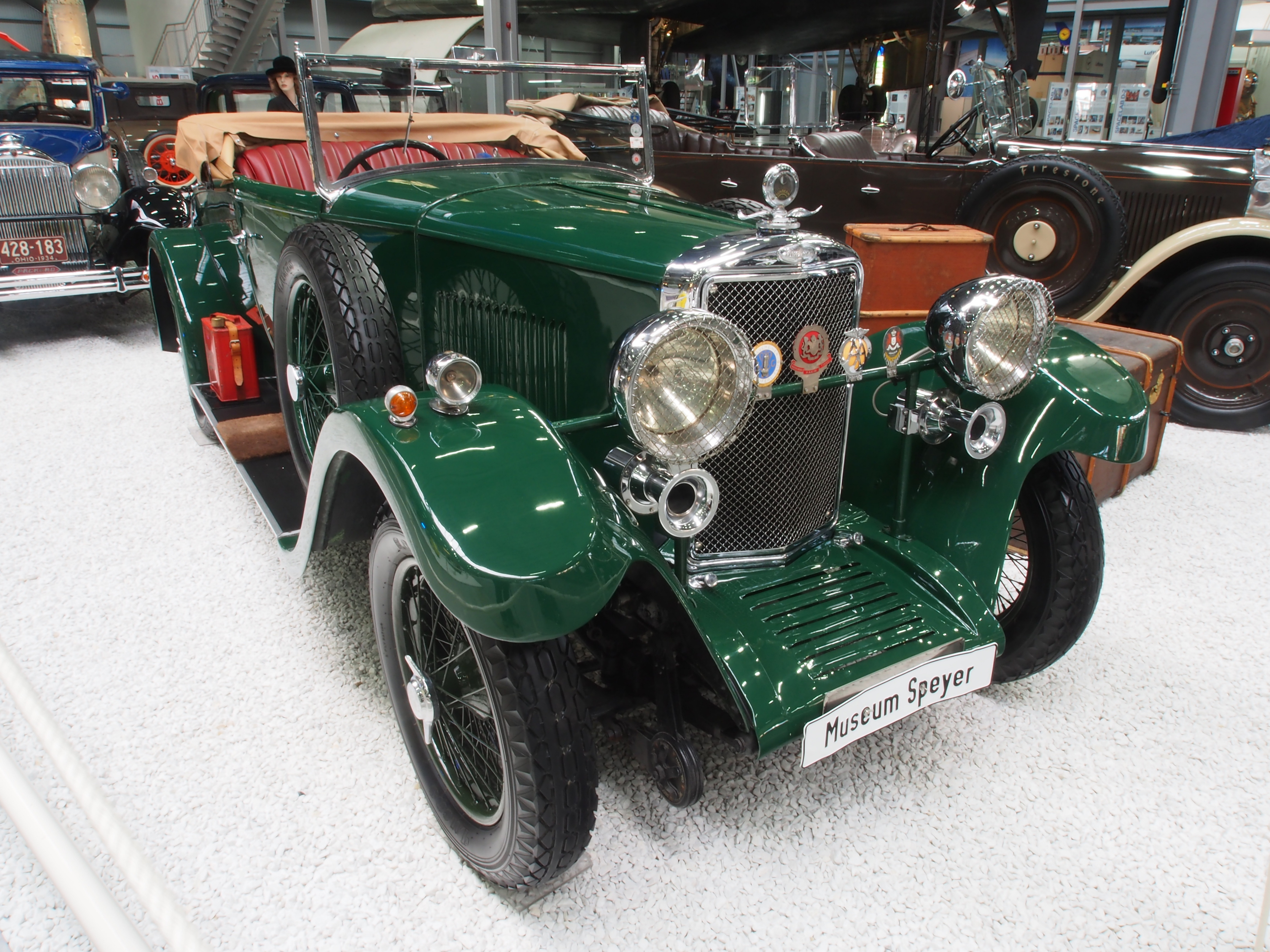 1929 Green Sunbeam HP 20.9 Open Tourer.